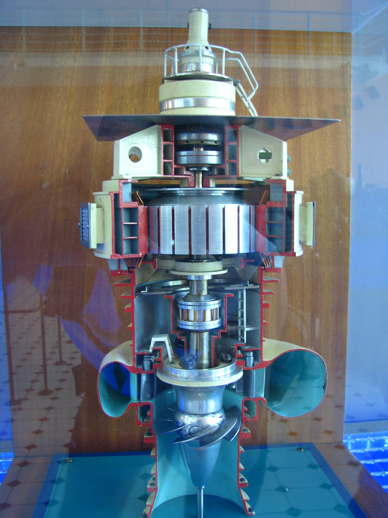 Rez turbinou